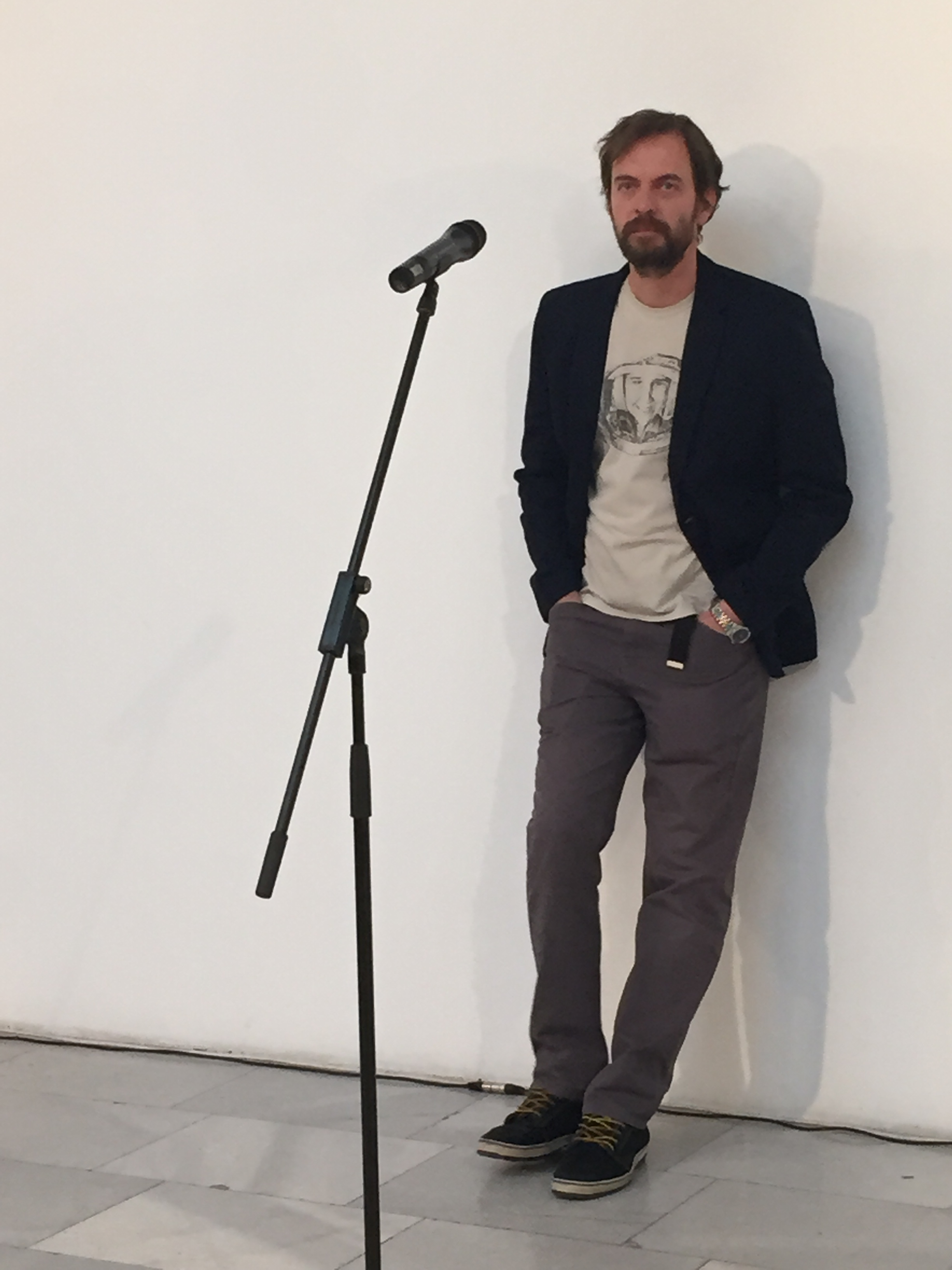 Иван Мудов